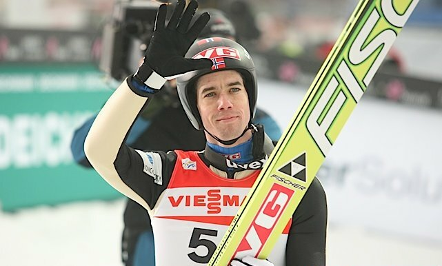 Anders Bardal podczas serii kwalifikacyjnej przed konkursem indywidualnym mężczyzn na skoczni normalnej na Mistrzostwach Świata w Narciarstwie Klasycznym 2011 w Oslo.